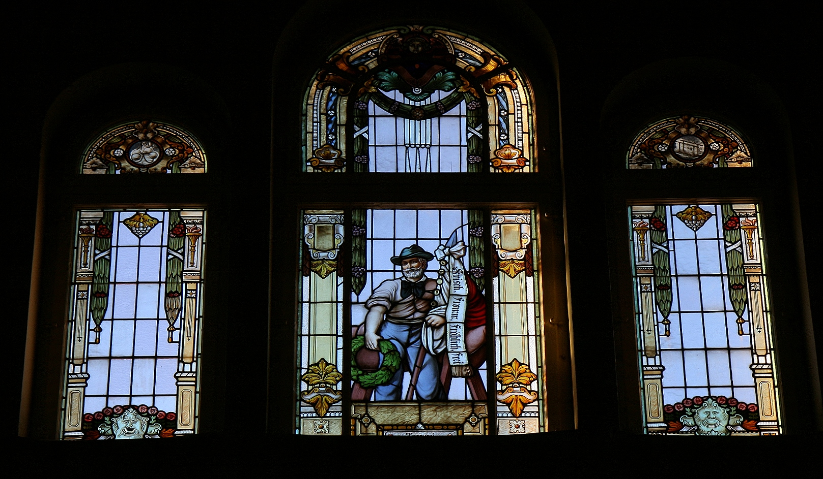 Motivfenter in der Schützenhalle in Lüdenscheid.